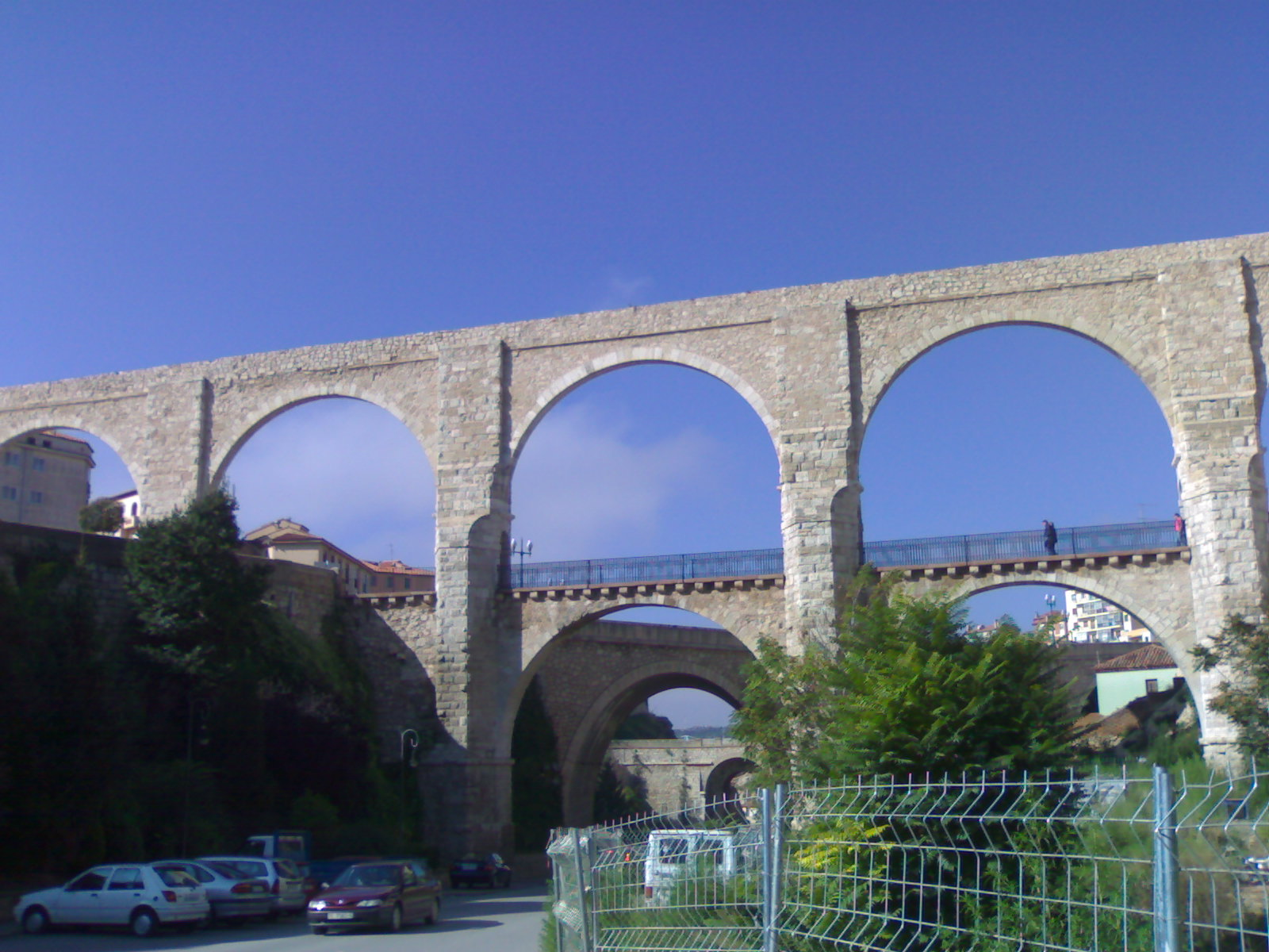 Los Arcos.